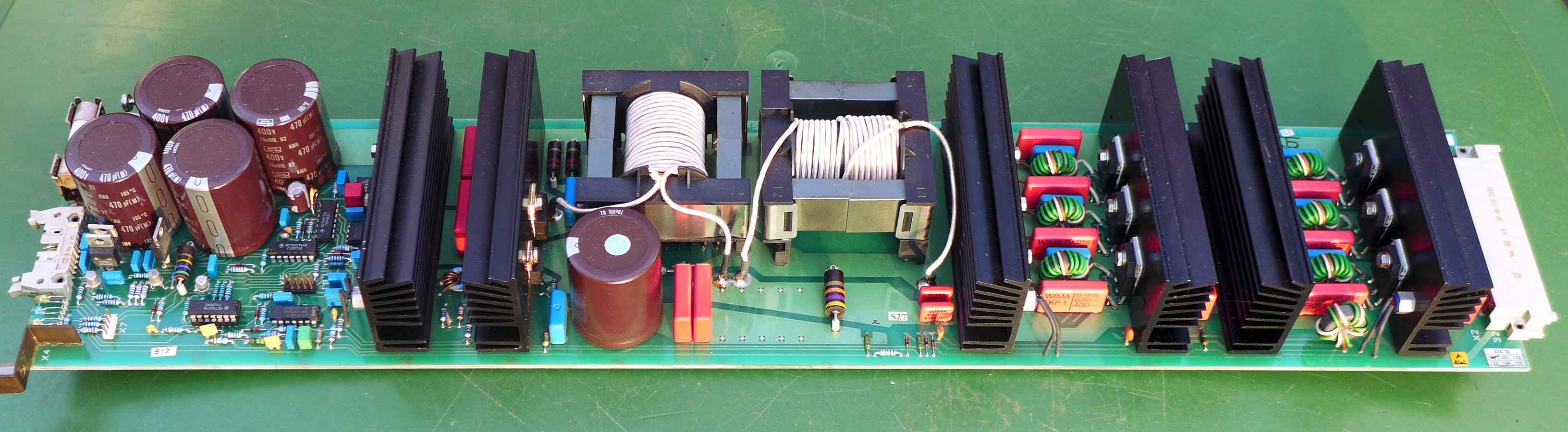 2 kW Einschub Mittelwellensender Thurnau